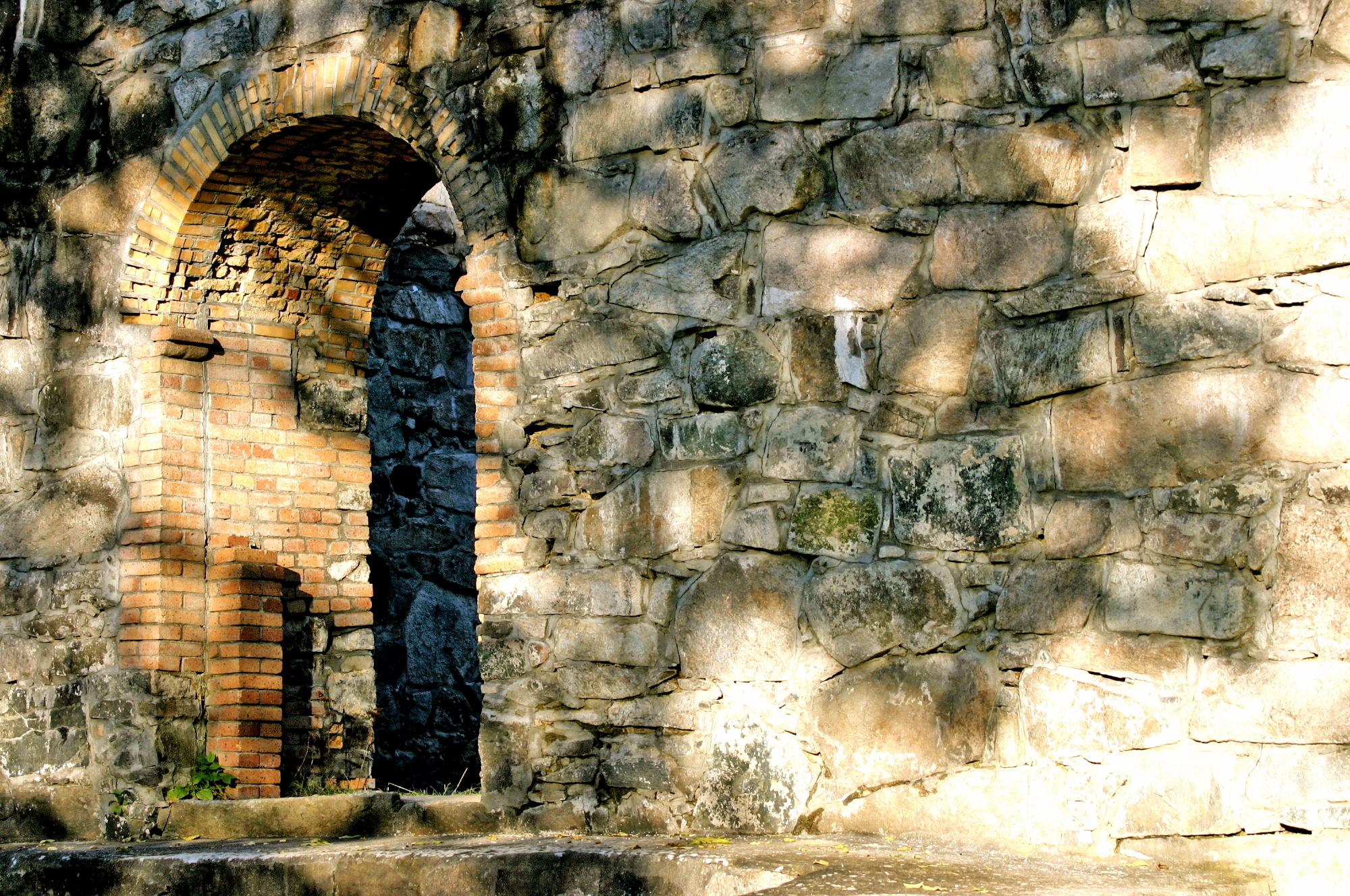 Holla kyrkjeruin